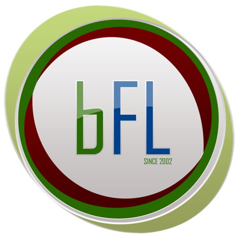 Лого на BFL Team 2008-2009